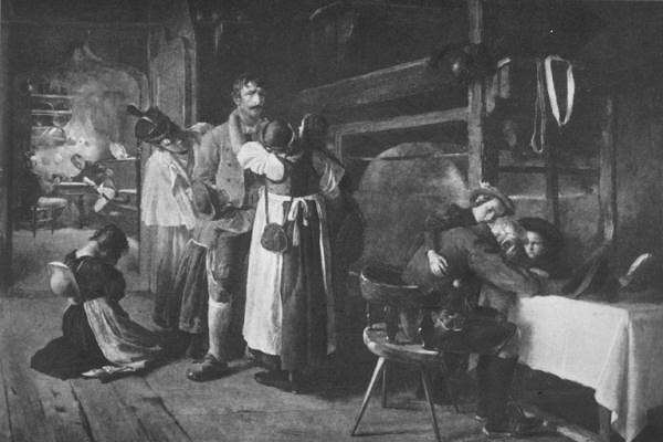 Peter Mayr nimmt Abschied von seiner Familie. Gemälde von Ferdinand Schmutzer, 1899.